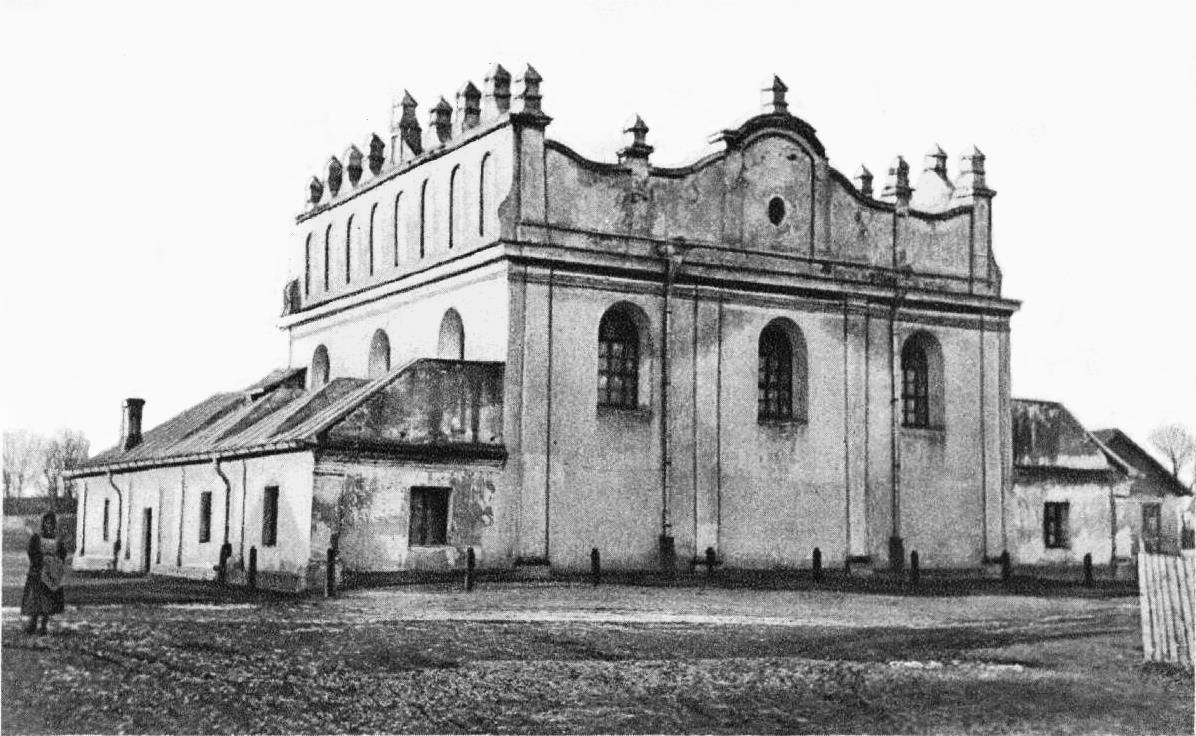 Синагога XVII ст. в Лешневі, була розібрана в кінці 1950-х - на початку 1960-их років.